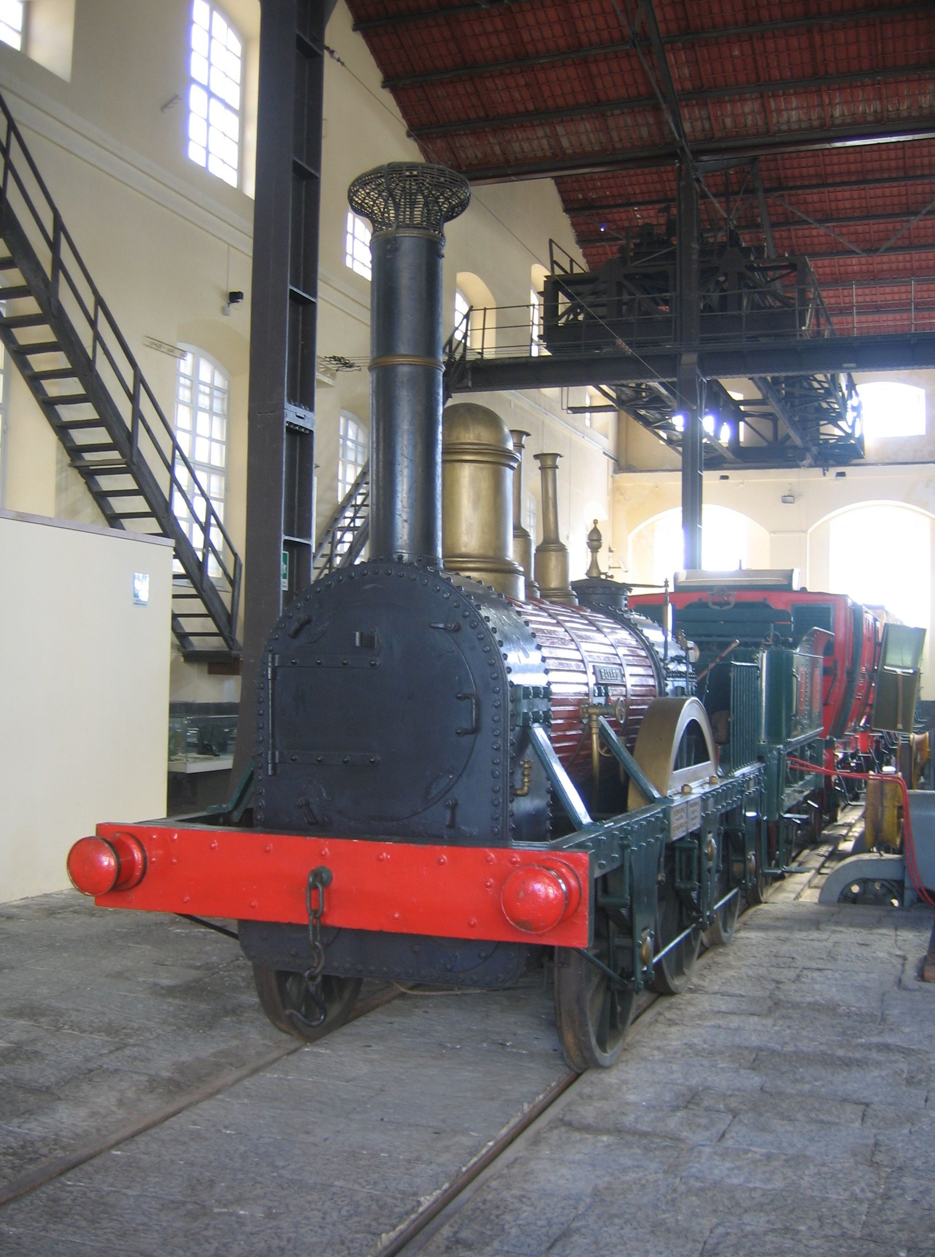 Erster italienischer Eisenbahnzug von 1839 (Nachbau) im Eisenbahnmuseum Pietrarsa